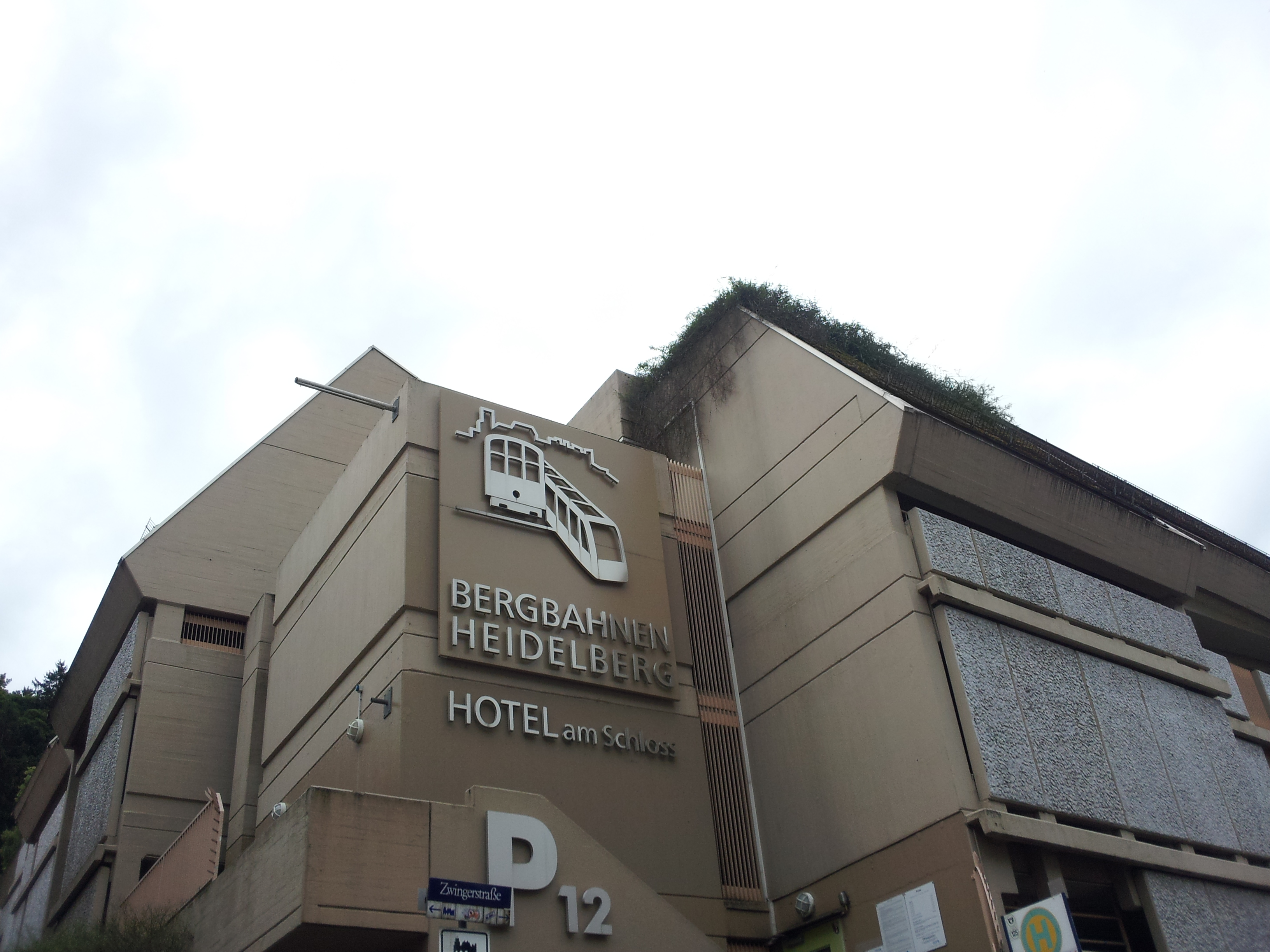 하이델베르크 성에 올라갈 때 탈 수 있는 등산열차 Heidelberger Bergbahnen